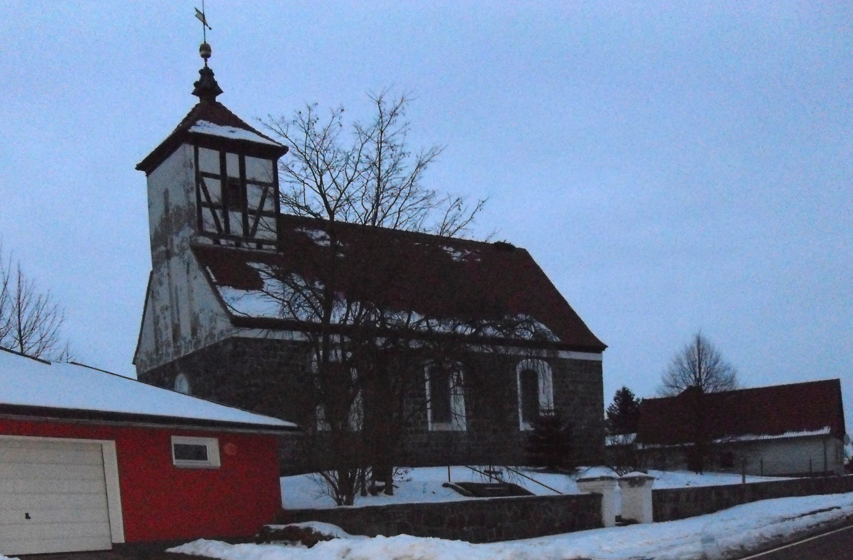 Dorfkirche in Serwest (Gemeinde Chorin)